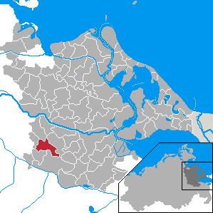 Krien, Landkreis Ostvorpommern, Mecklenburg-Vorpommern